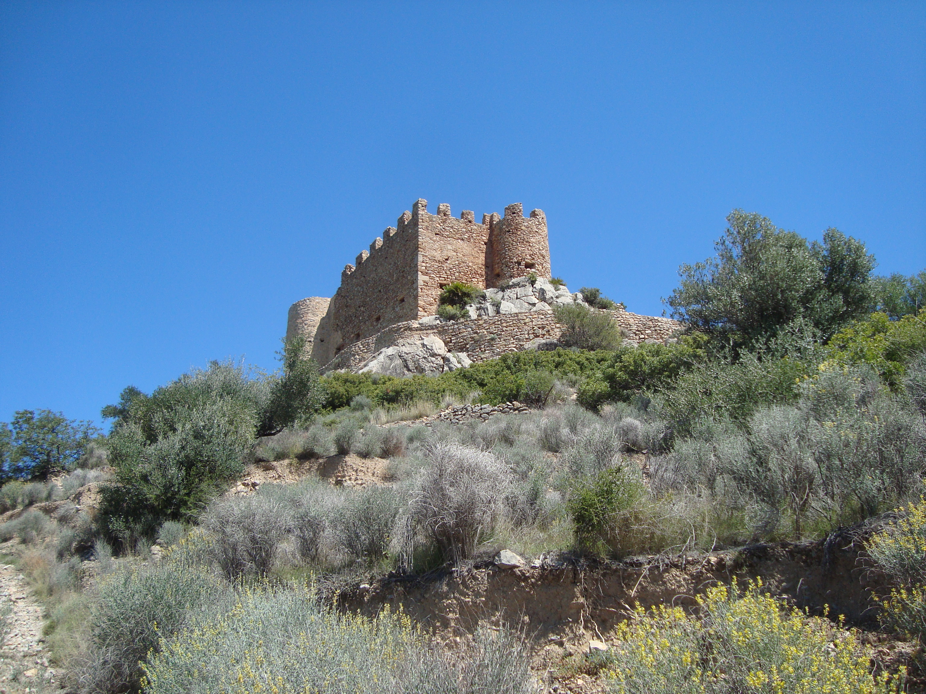 Castell de l'Alcalatén (l'Alcora) See also: Castles in Spain, Castle and Castell de l'Alcalatén.